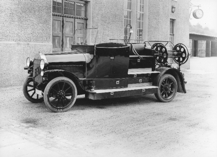 Benz-Motorspritze Typ 1 CS